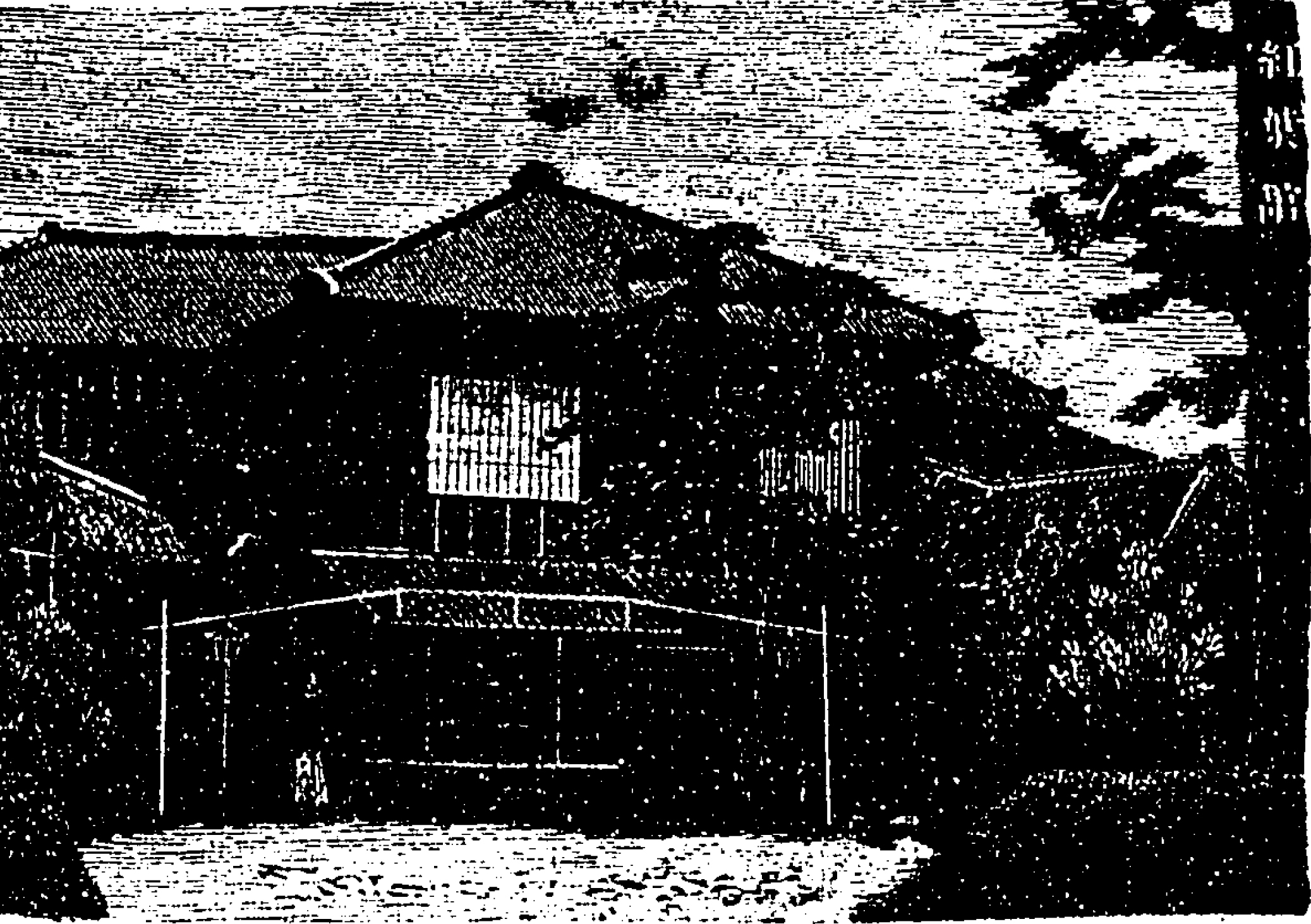 料亭「紅葉館」中野了随『東京名所図絵』（小川尚栄堂、1890年）より